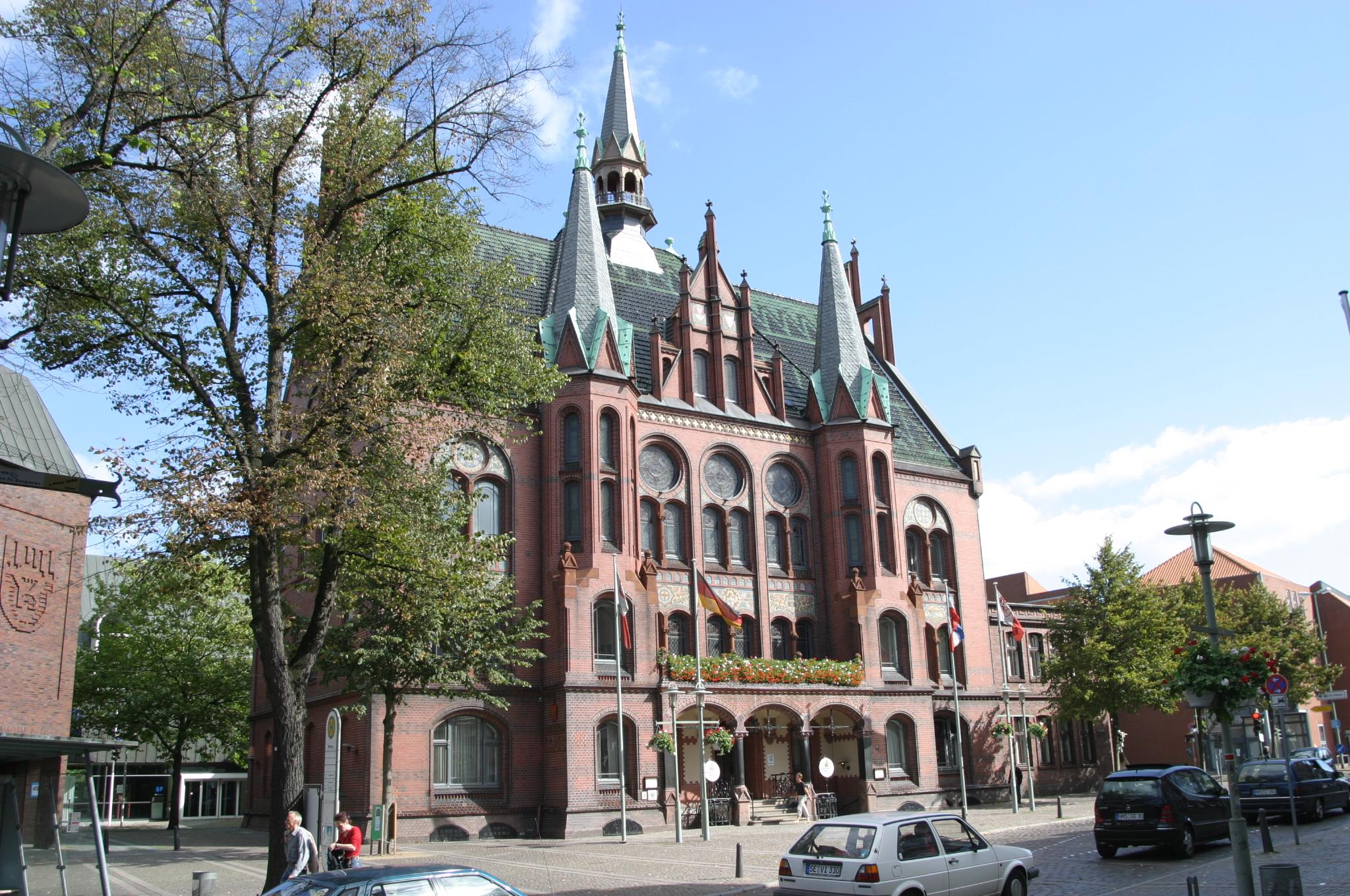 Neugotisches Rathaus (city hall), Neumuenster Germany